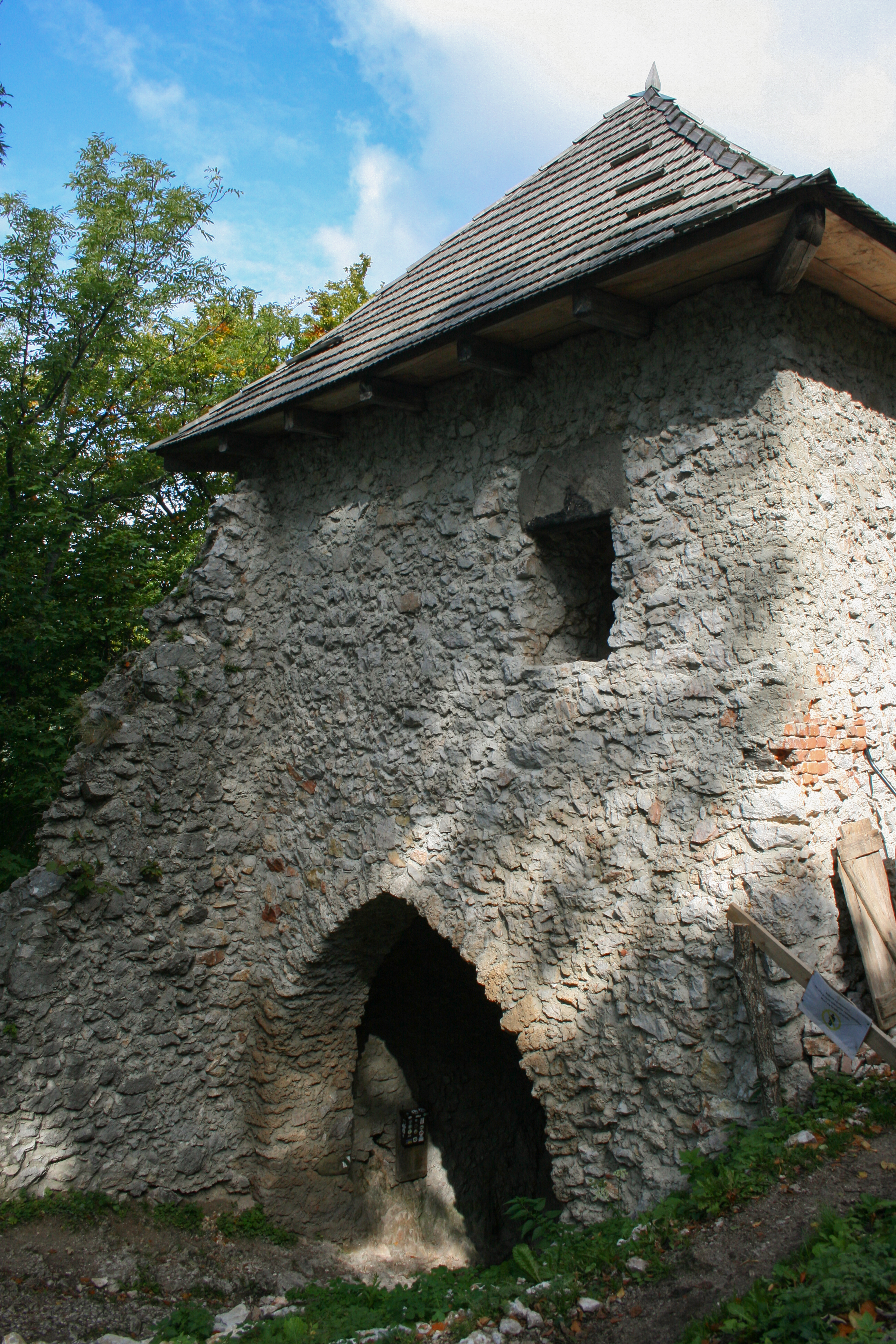 Hradná brána v septembri 2017